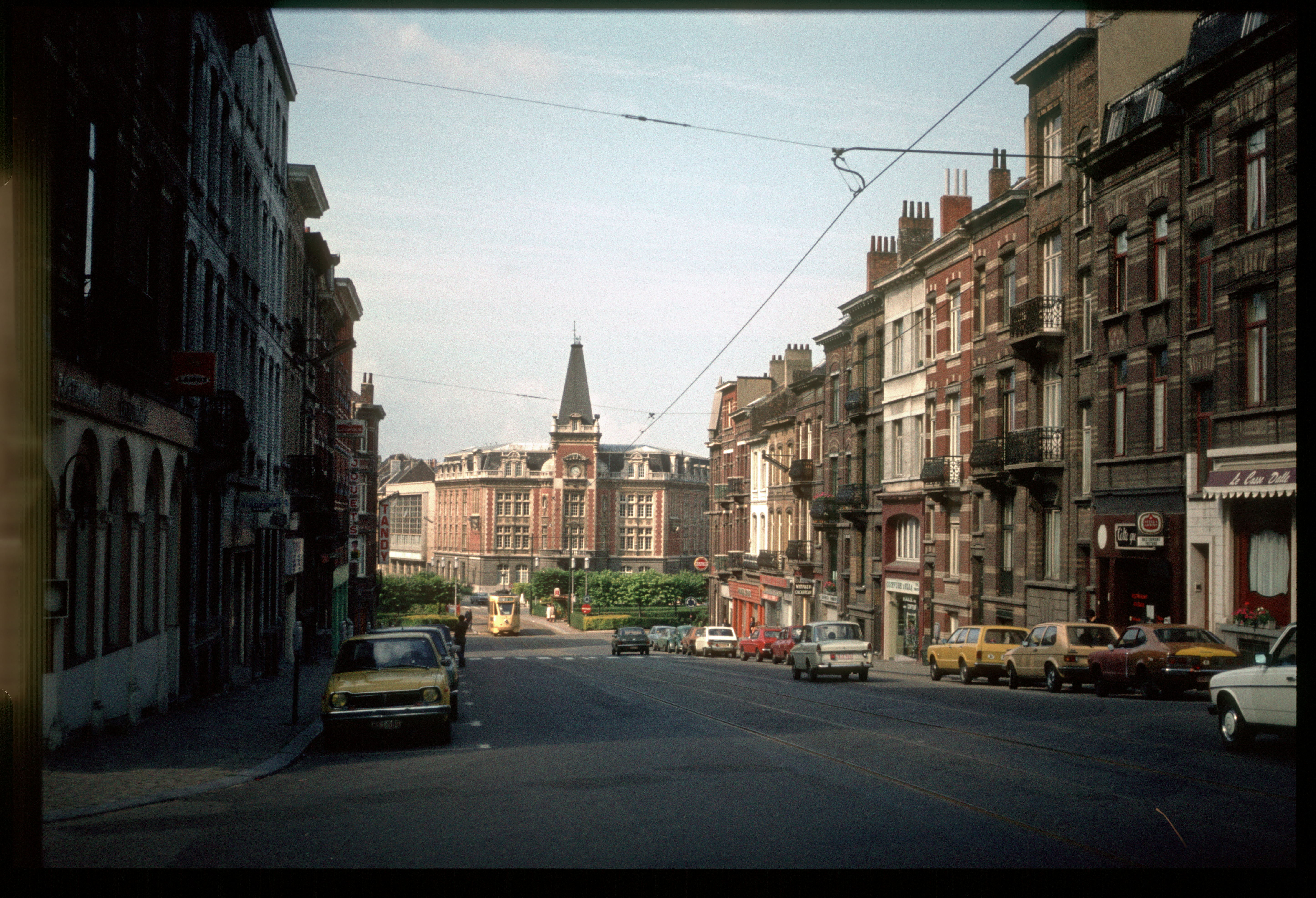 Avenue des Celtes, Etterbeek